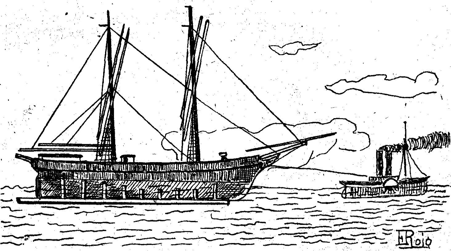 La pollacra Bella Dolores fermada a l'anguila amb la que va fer el viatge de Barcelona a Lloret de Mar, remolcada per un remolcador.